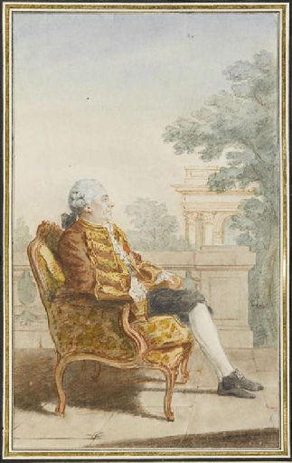 Gérard Binet, baron de Marchais par Louis Carrogis dit CARMONTELLE (Paris 1717-1806) Conservé au Musée Condé, château de Chantilly